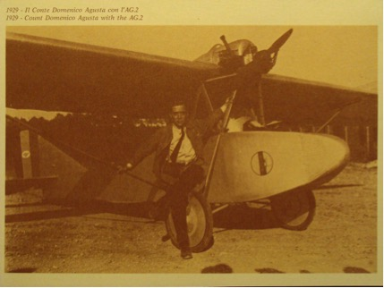 Monoplano Augusta AG.2 con il Conte Augusta Licensing Categoria:Immagini di aeroplani